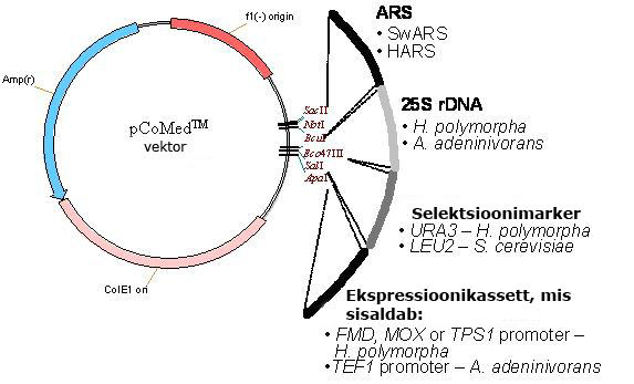 CoMed vektorsüsteemi disain ja funktsionaalsus. See sisaldab kõiki E. coli elemente, mis on vajalikud vektori paljundamiseks E. coli süsteemis ja lisaks ka multikloneerimissaiti, mis on vajalik ARSi, rDNA, selektsioonimarkeri ja ekspressioonikaseti integratsiooniks. Sellel eesmärgil on ARS fragmendid märgistatud SaclI ja BcuIga restriktsioonikohtadega ning rDNA regioon on märgistatud BcuI ja Eco47III restriktsioonikohtadega. Selektsioonimarker jääb Eco47III ja SalI restriktsioonikohtade vahele ja promooteralament jääb SalI ja ApaI restriktsioonikohtade vahele.